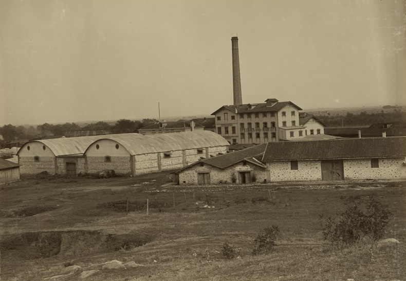 Фабрика за спирт и ориз на А. Бомонти в Пловдив. Фотоалбум с фотографии на български индустриални предприятия от периода 1887-1912 г., подарен от Съюза на българските индустриалци на цар Фердинанд І по случай 25-годишнината от възшествието му на българския престол.